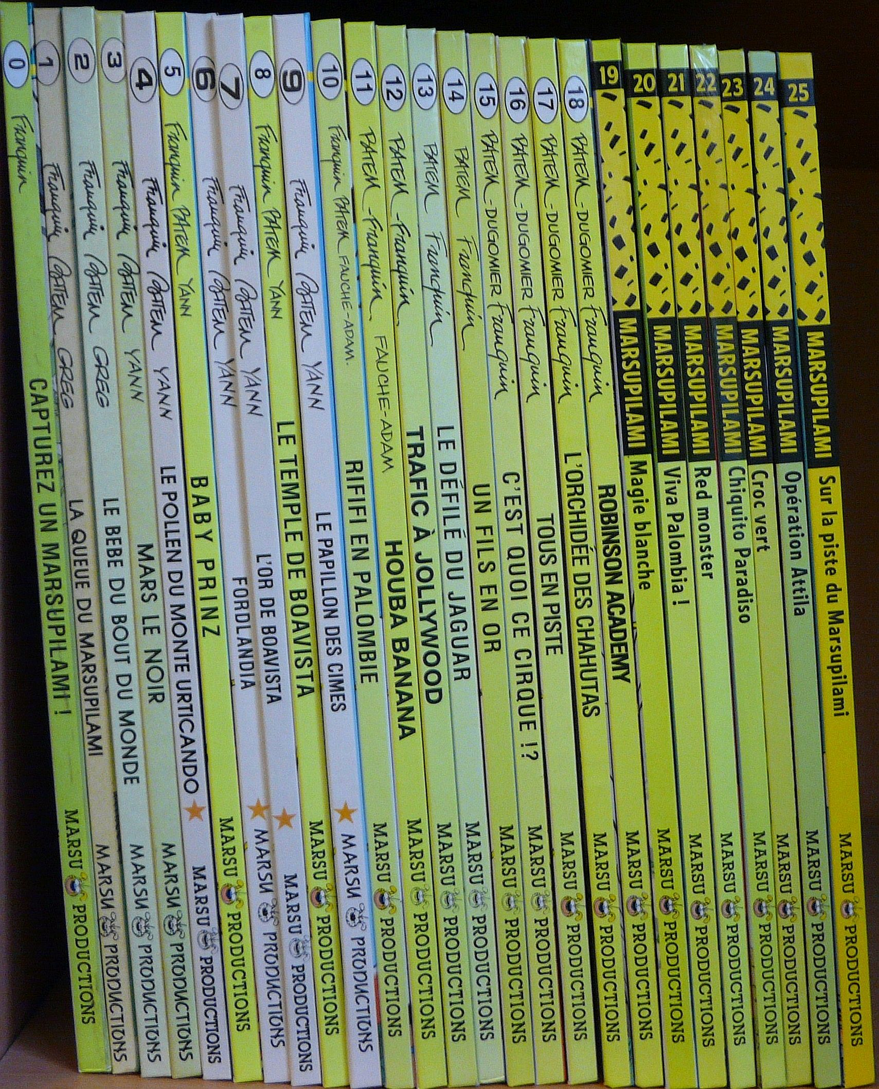 Collection de bande dessinée Marsupilami, numéros 0 à 25.